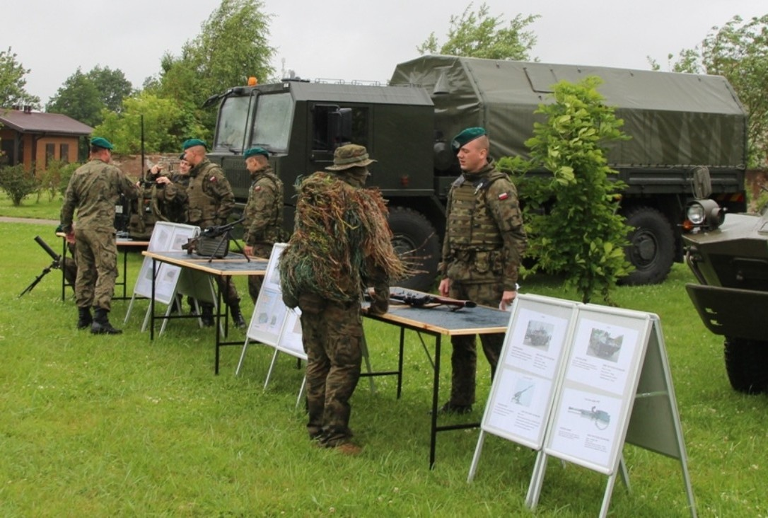 102 batalion ochrony